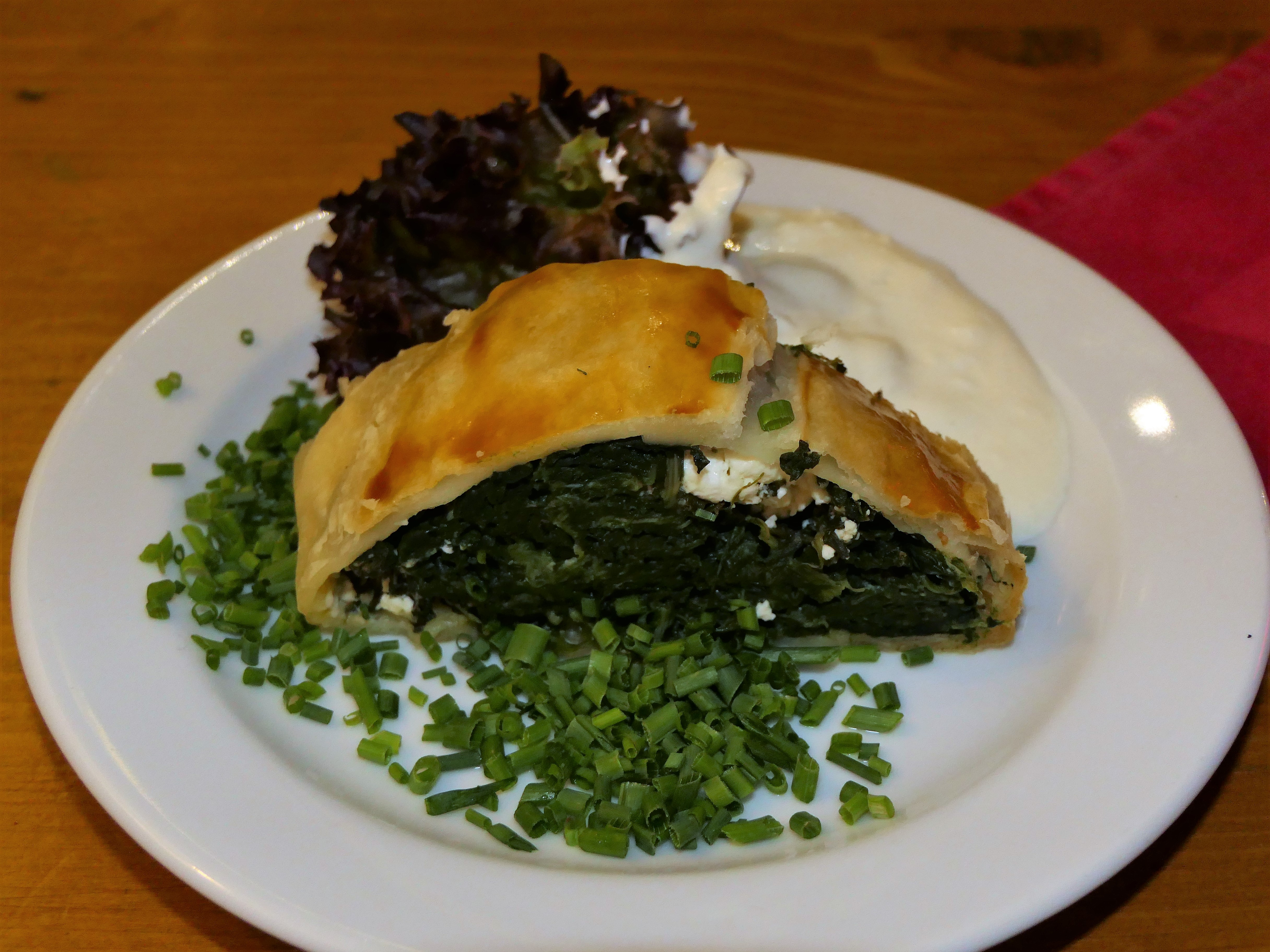 Spinatstrudel, Heuriger Feuerwehr Wagner in Wien